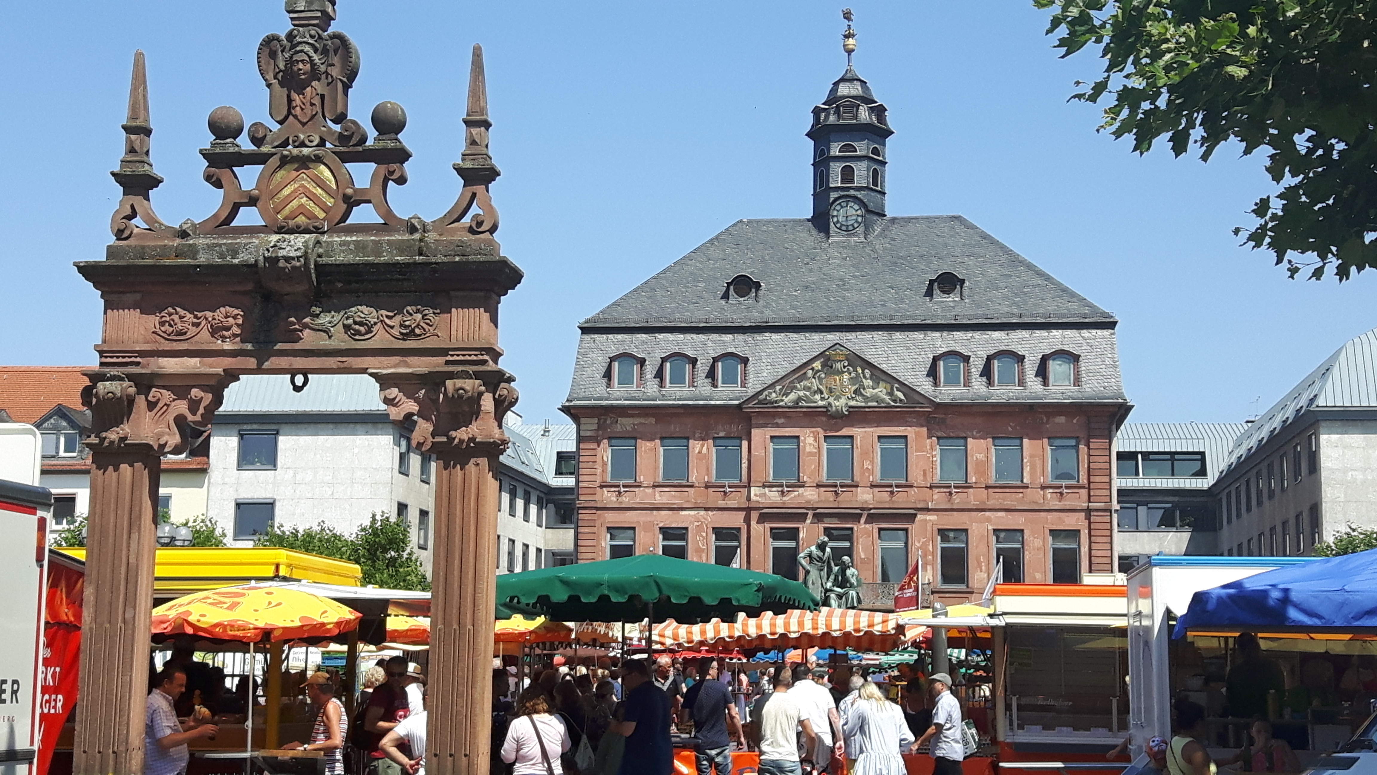 Wochenmarkt vor dem historischen Rathaus